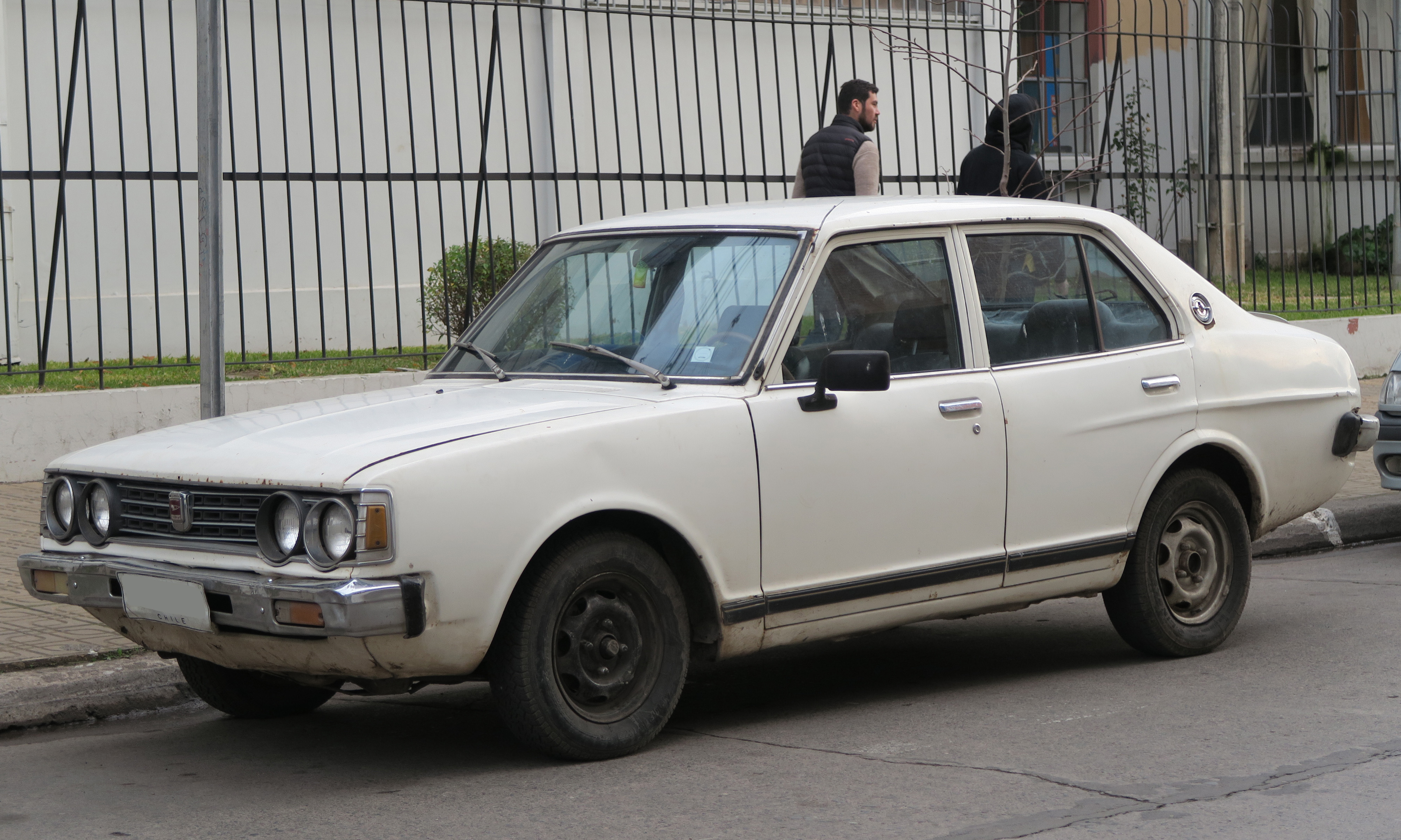 Daihatsu Charmant 1981